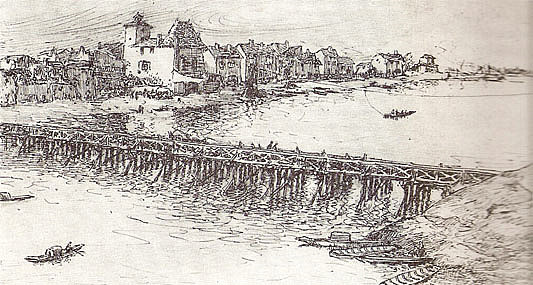 Roanne en 1714